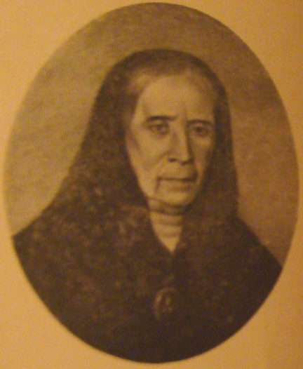 Ana Riglos (1788-1870), patricia, esposa de Miguel de Irigoyen